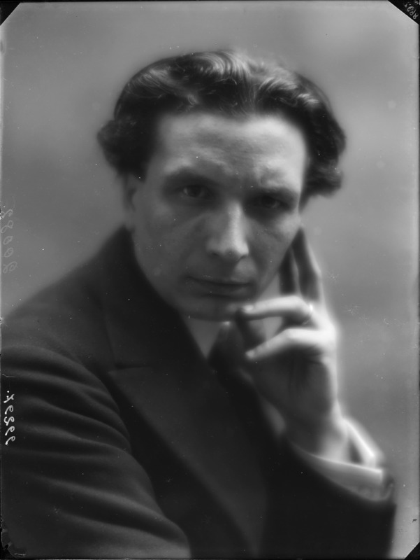 Antonio Guarnieri fotografato da Mario Nunes Vais